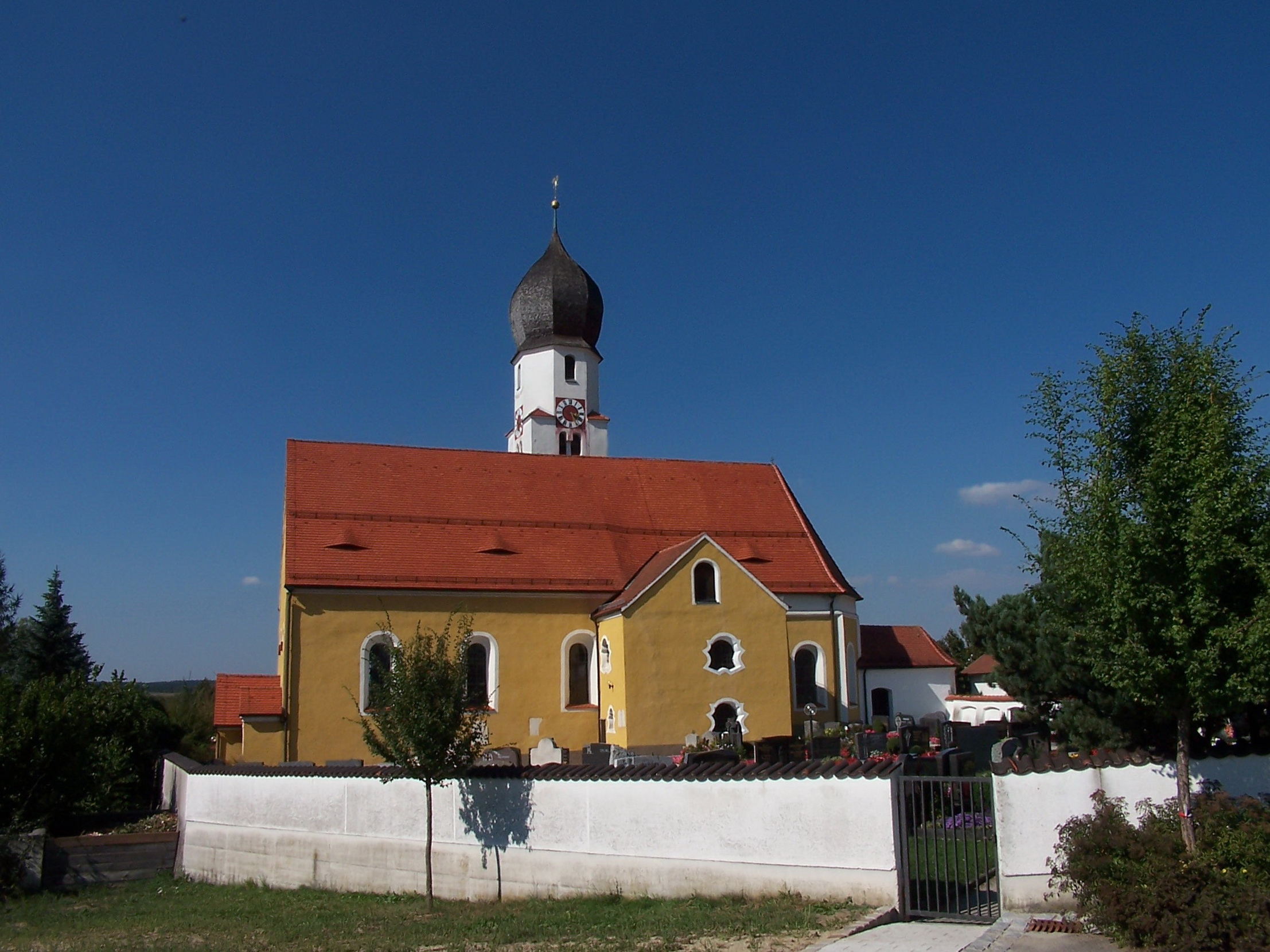 Herrngiersdorf, Sandsbach, Am Kirchberg 2. Katholische Pfarrkirche St. Petrus, Saalkirche mit Steildach und eingezogenem, fünfseitig geschlossenem Chor, Turm mit Zwiebelhaube, in die Nordostecke des Langhauses eingestellt, Langhaus und Turm im Kern um Mitte 13. Jahrhundert, Chor spätgotisch, Mitte 15. Jahrhundert, Umgestaltung der Kirche nach Mitte 18. Jahrhundert; mit Ausstattung; Seelenkapelle, dreiseitig geschlossener Walmdachbau, als Chorscheitelkapelle ausgebildet, 18. Jahrhundert; Kirchhofummauerung, 18./19. Jahrhundert; darin eingelassener Grabstein von 1473. Die Kirche ist nicht wie üblich mit dem Chor nach Osten ausgerichtet, sondern ist etwa 45 Grad nach Nordost gedreht. Das Bild zeigt somit die Ansicht von Süden nach Norden.